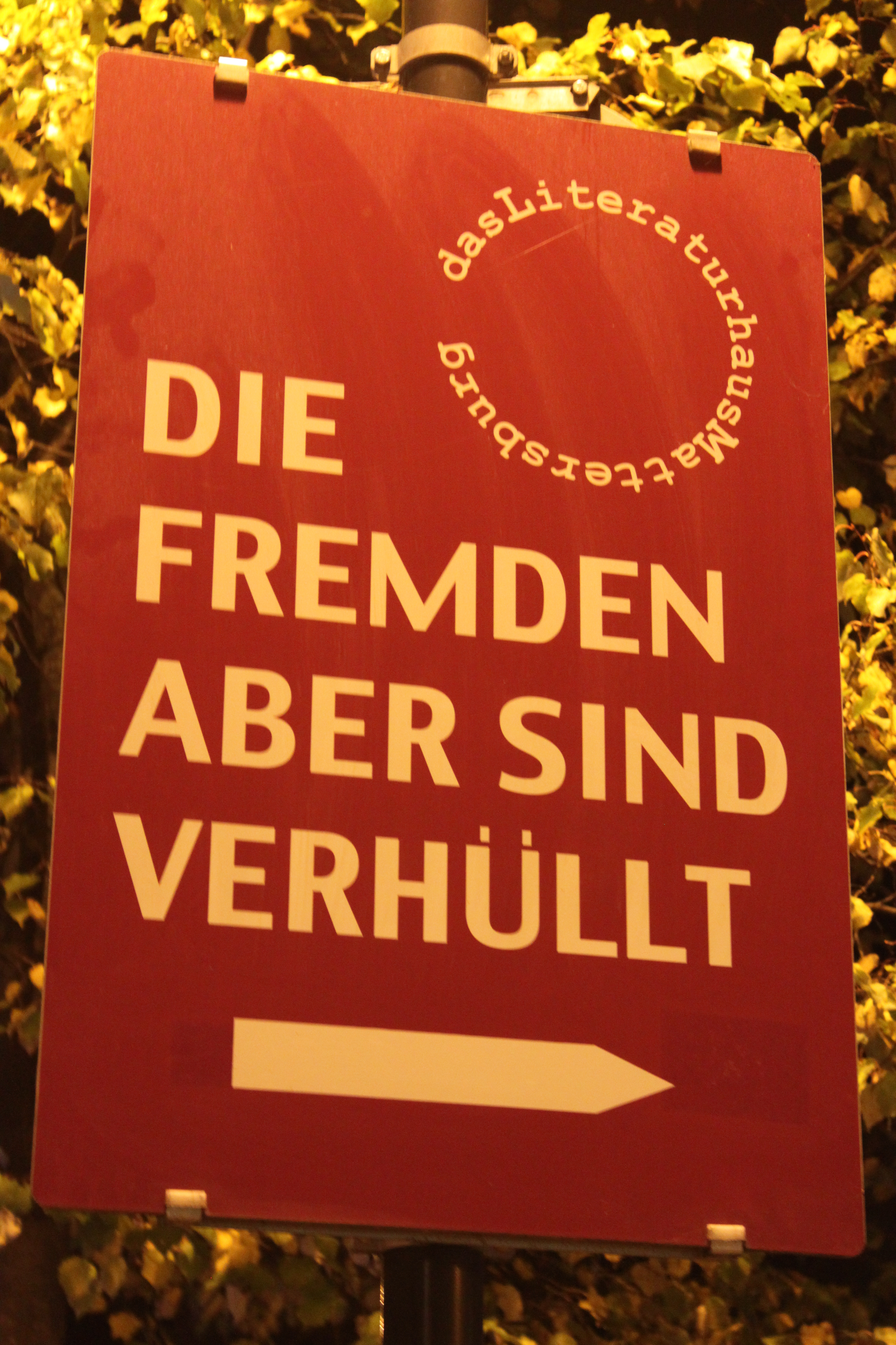 Literaturhaus Mattersburg, Straßenhinweis